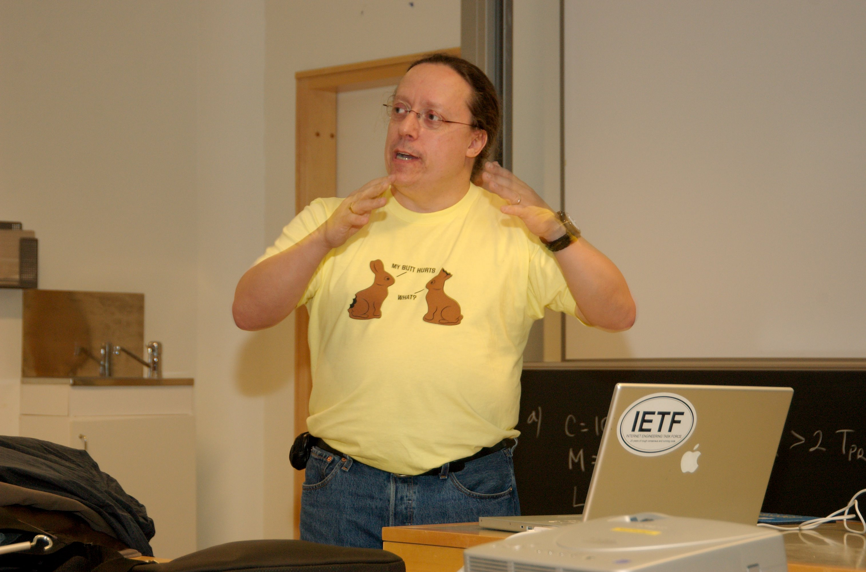 Patrik Fälström föreläser på Stacken, KTH.